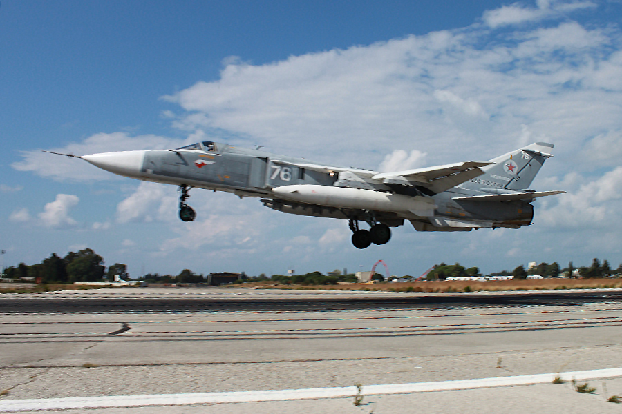 Боевая работа российской авиации в Сирии